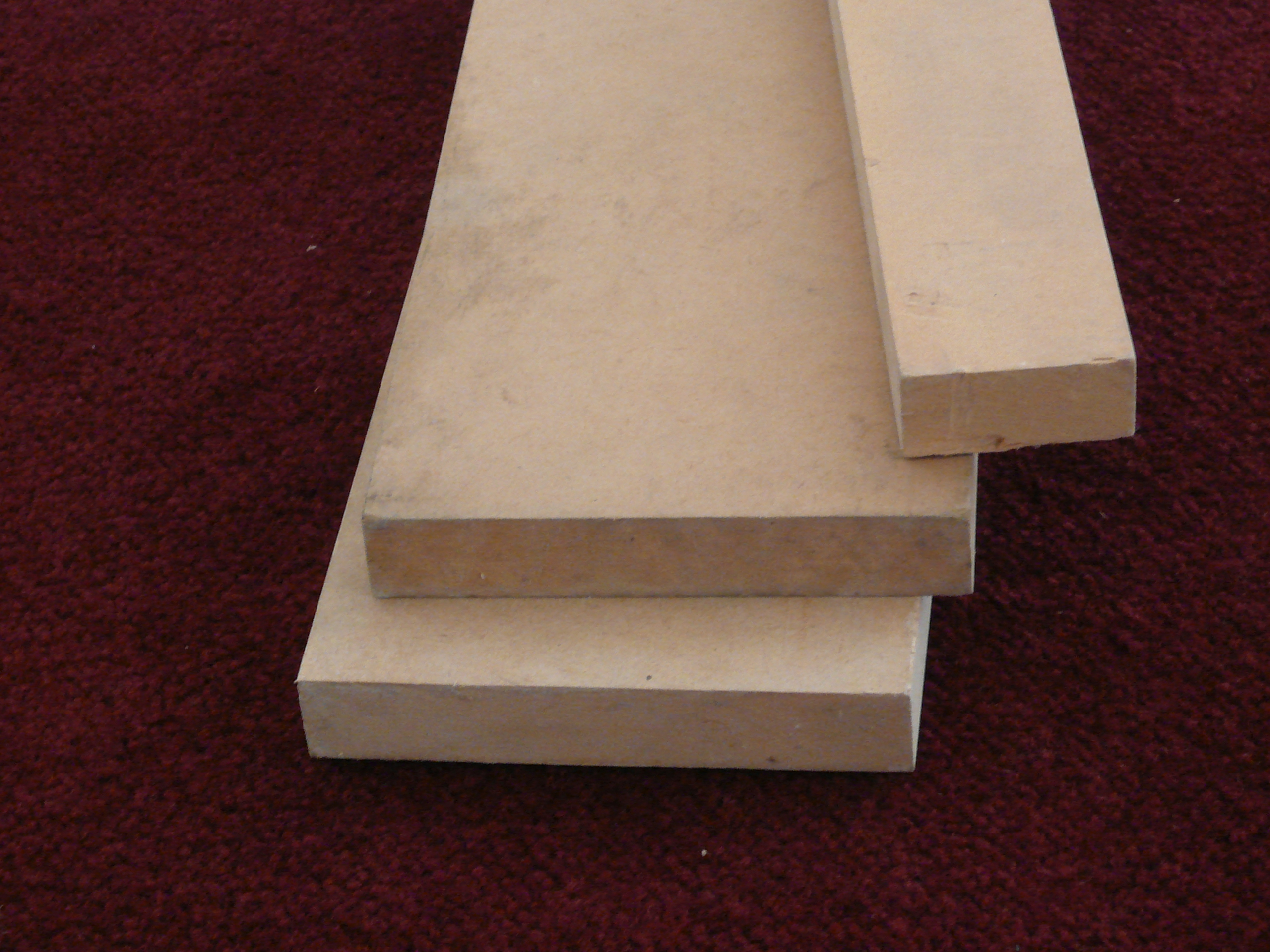 MDF samples taken by Vaderluck.